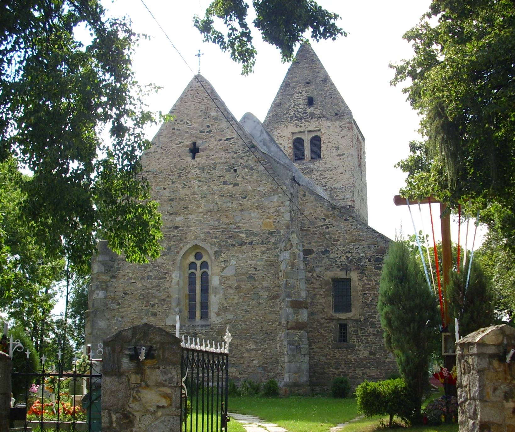 Stary Zamek (gm. Sobótka, pow. wrocławski, woj. dolnośląskie, Polska). Kościół romański pw. św. Stanisława z drugiej połowy XIII w.